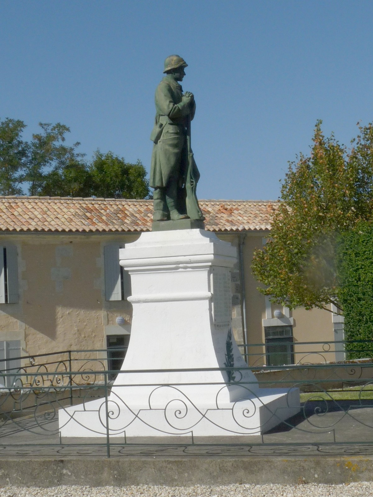 Monument aux morts, Rouffignac, Charente-Maritime, France